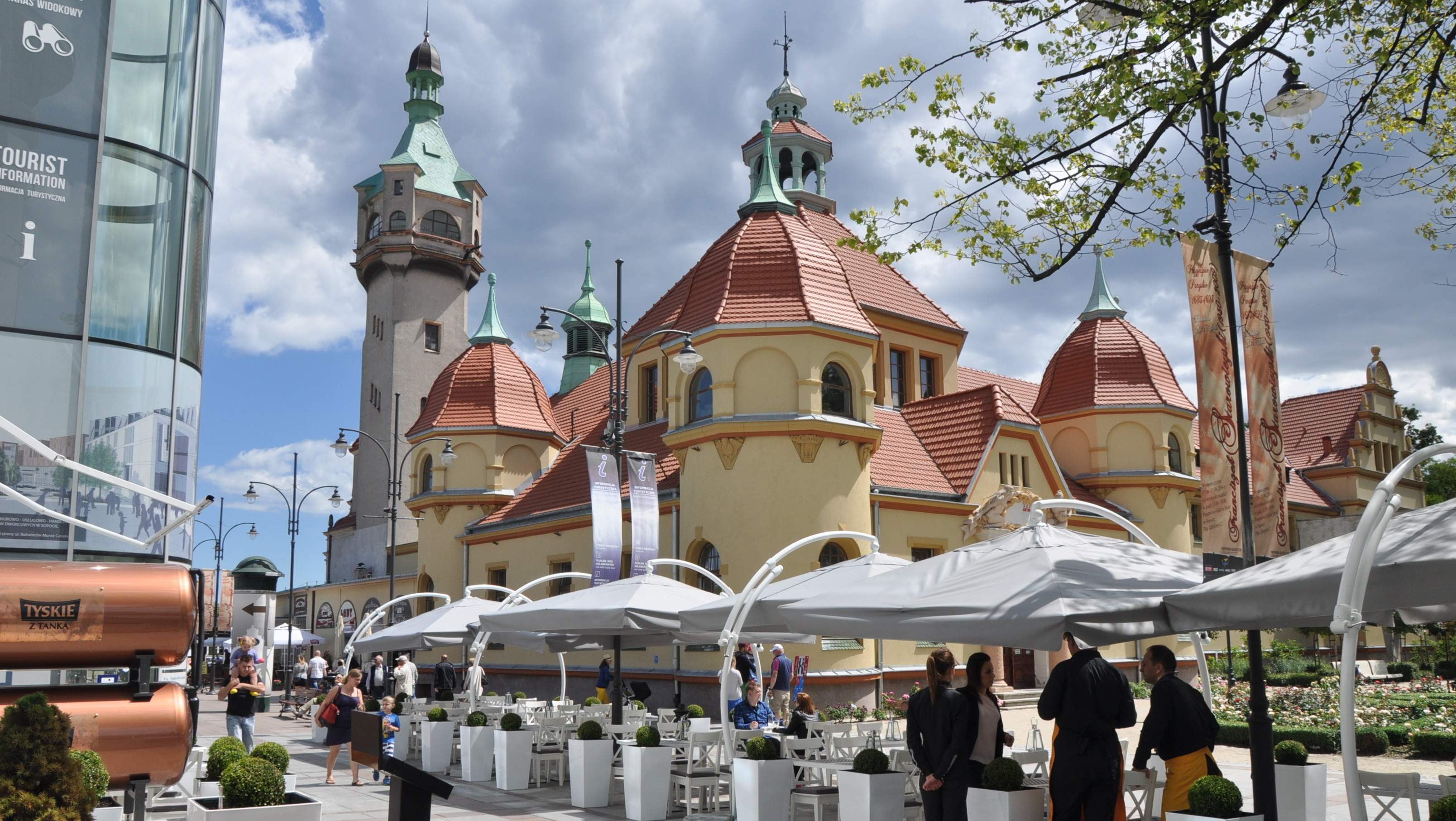 Sopot Dolny, pl. Zdrojowy - Zakład Balneologii, 1903-1904